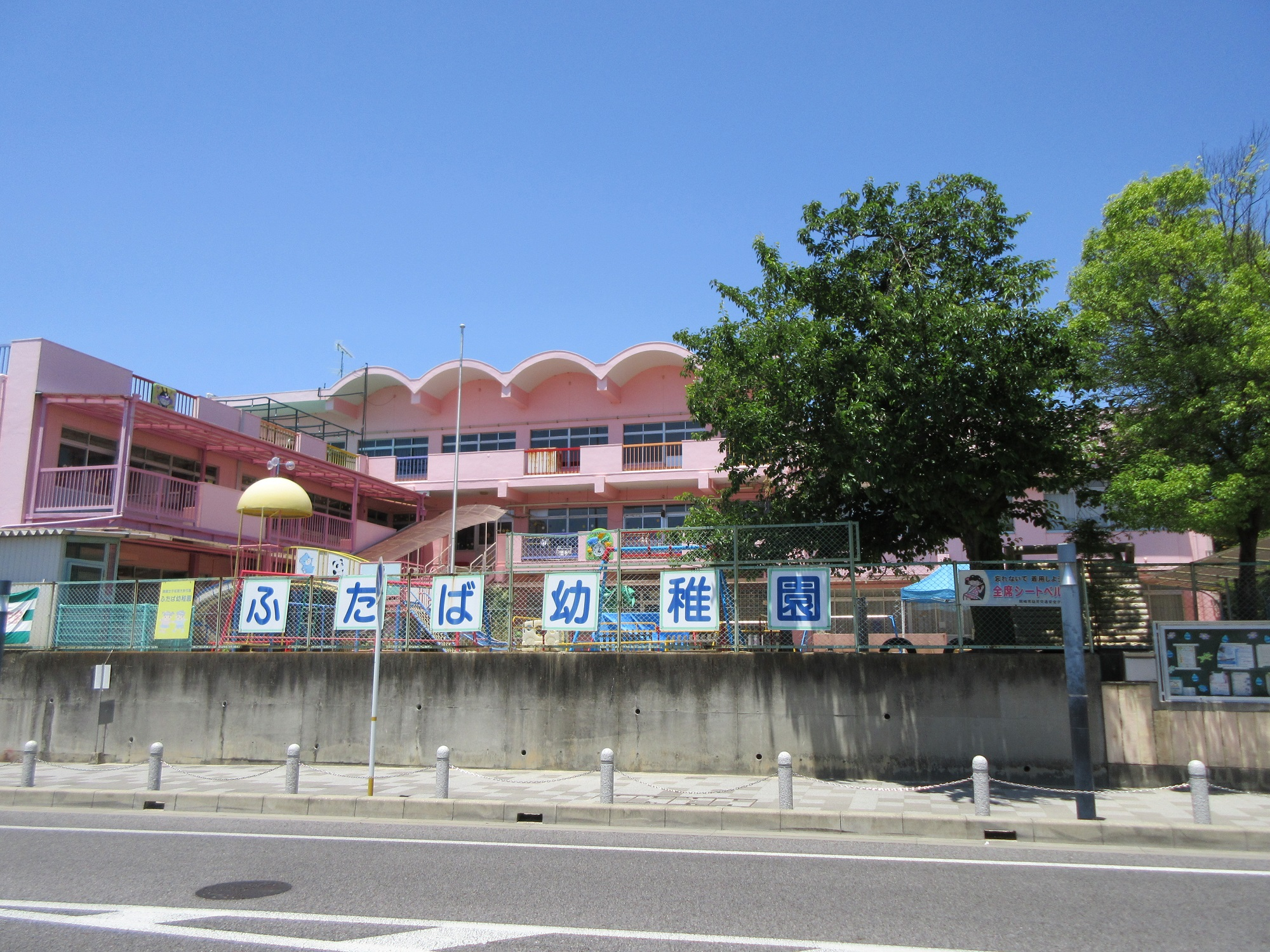 嫩幼稚園（岡崎市魚町）